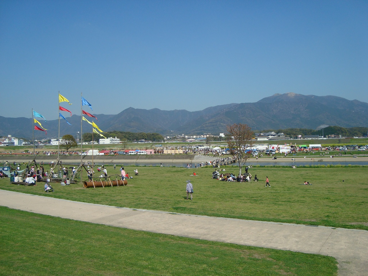 2014年、遠賀川河川敷にて撮影。